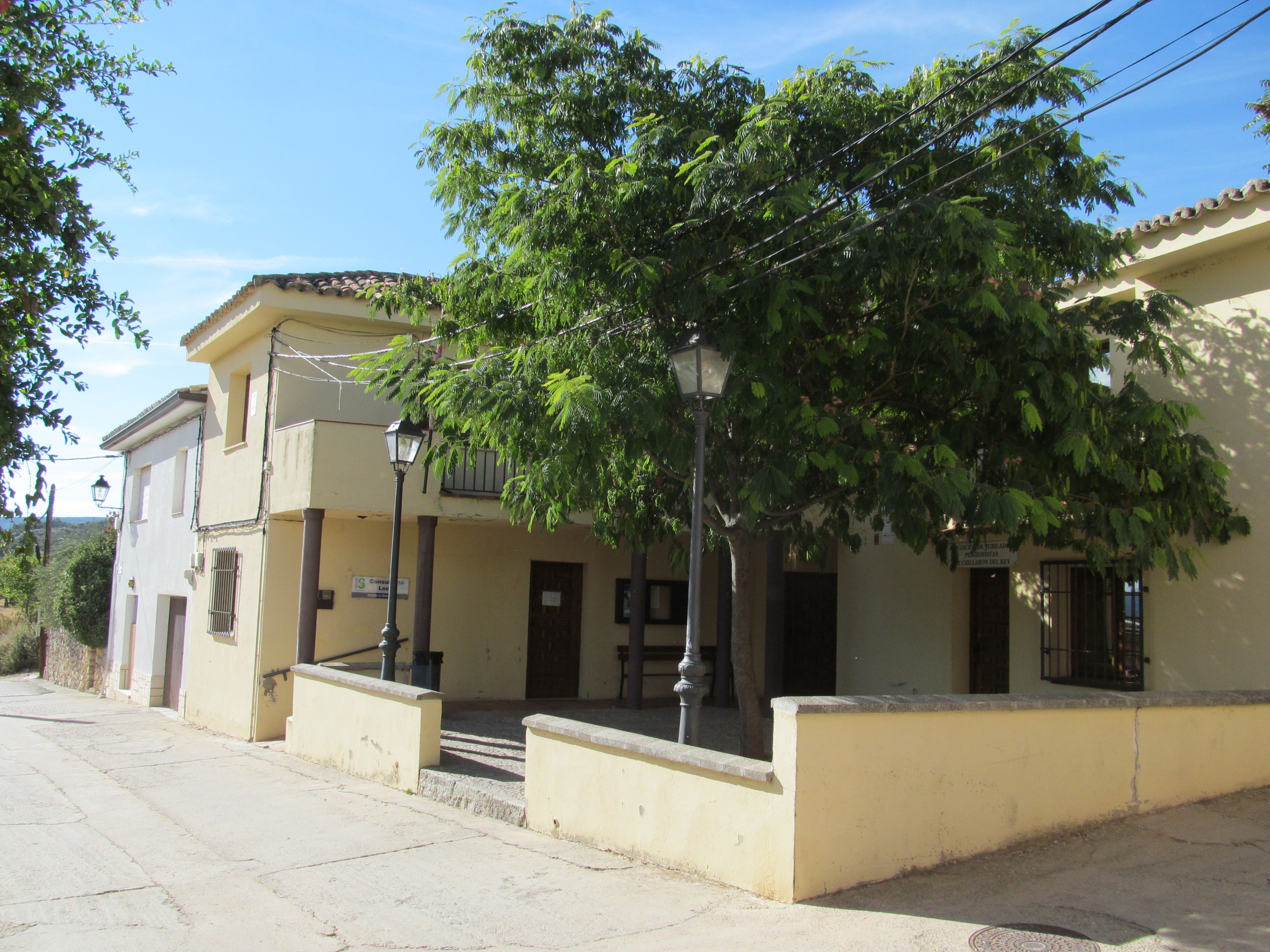 Chillarón del Rey - Casa del Ayuntamiento.